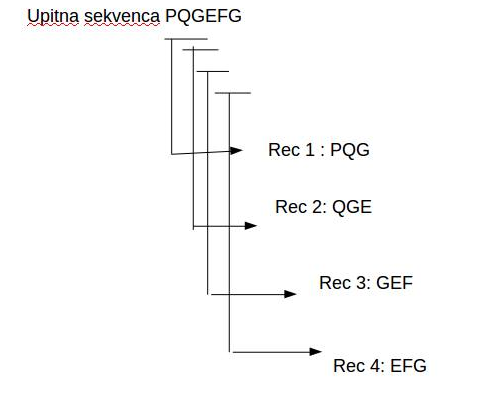 Metoda za pravljenje "k"-slovne liste upitnih reči